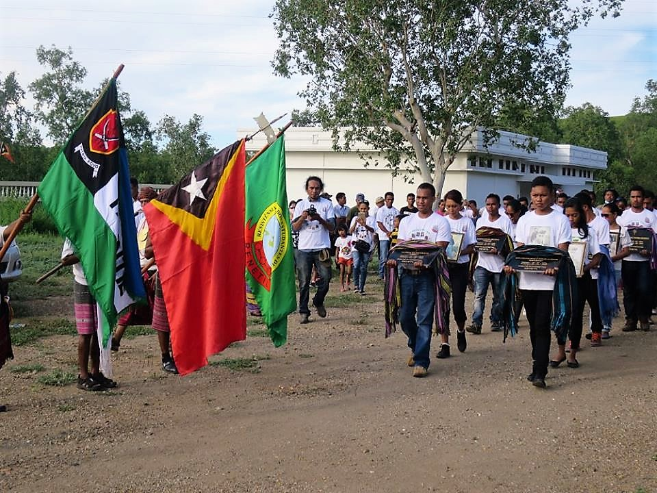 Homenagem aos Heróis e Mártires da RENETIL, Jardim dos Heróis e Martires da Pátria em Metinaro